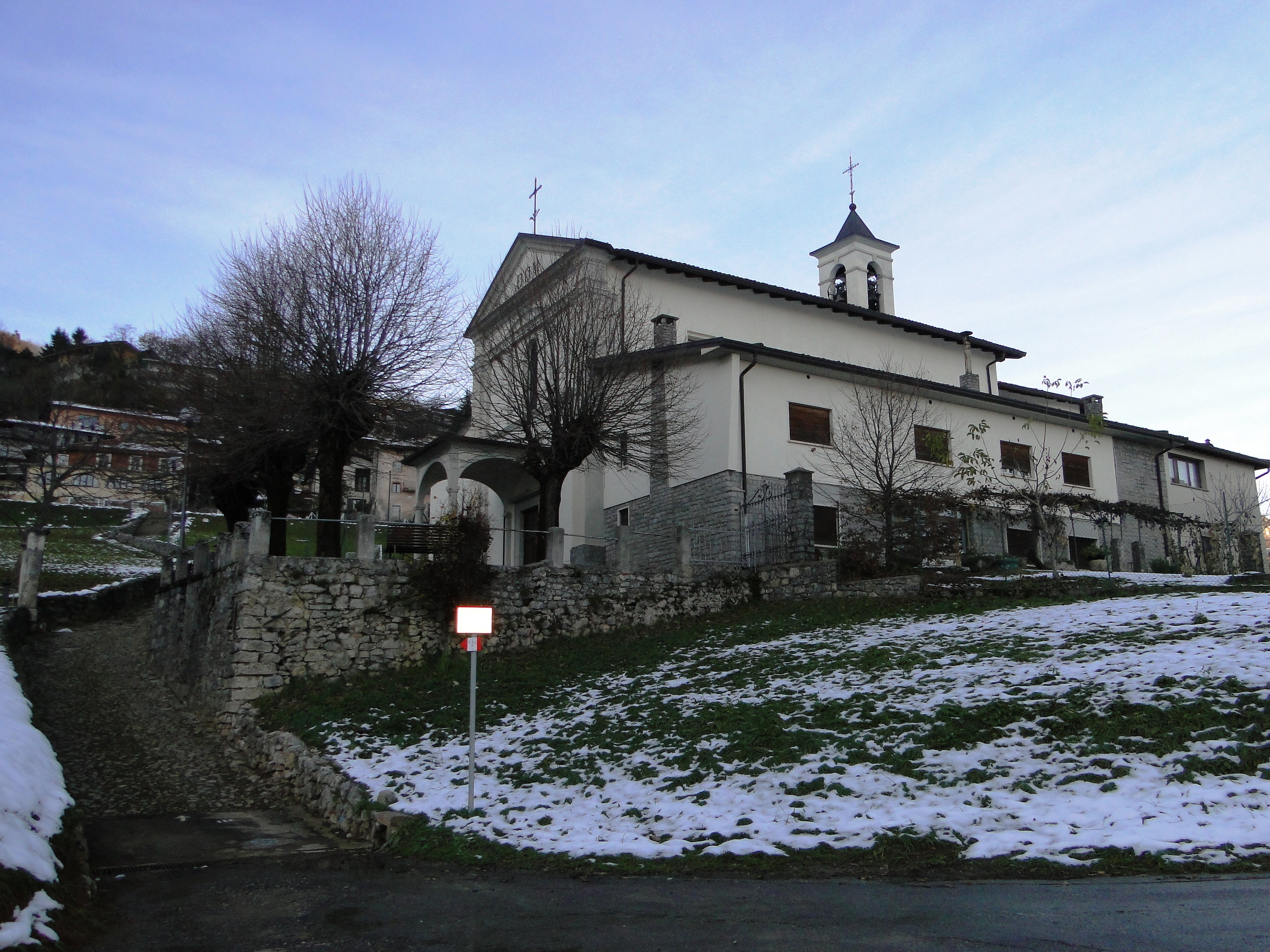 Bondo, fraz. di Colzate (BG). Chiesa di san Bernardino